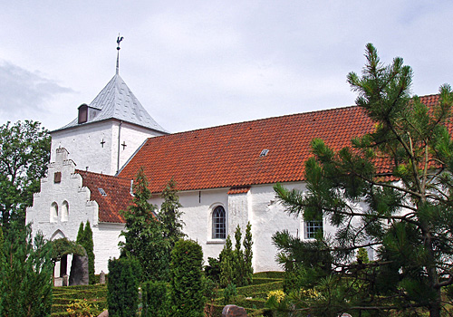 Ormslev Kirke Ning Herred, Århus Amt, Denmark Image by user:Nico-dk/Nils Jepsen